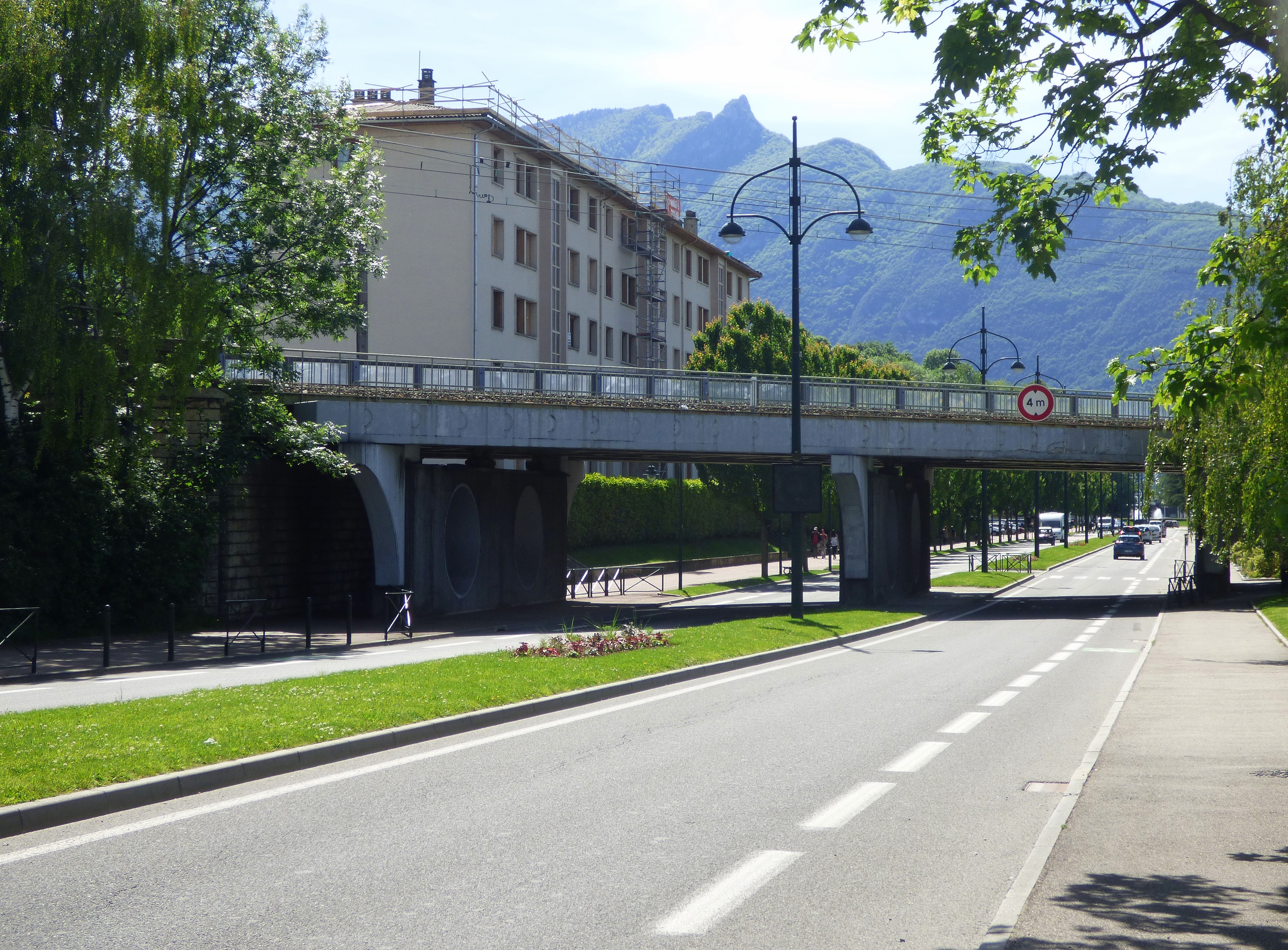 Pont SNCF du boulevard Maréchal de Lattre de Tassigny à Aix-les-Bains.